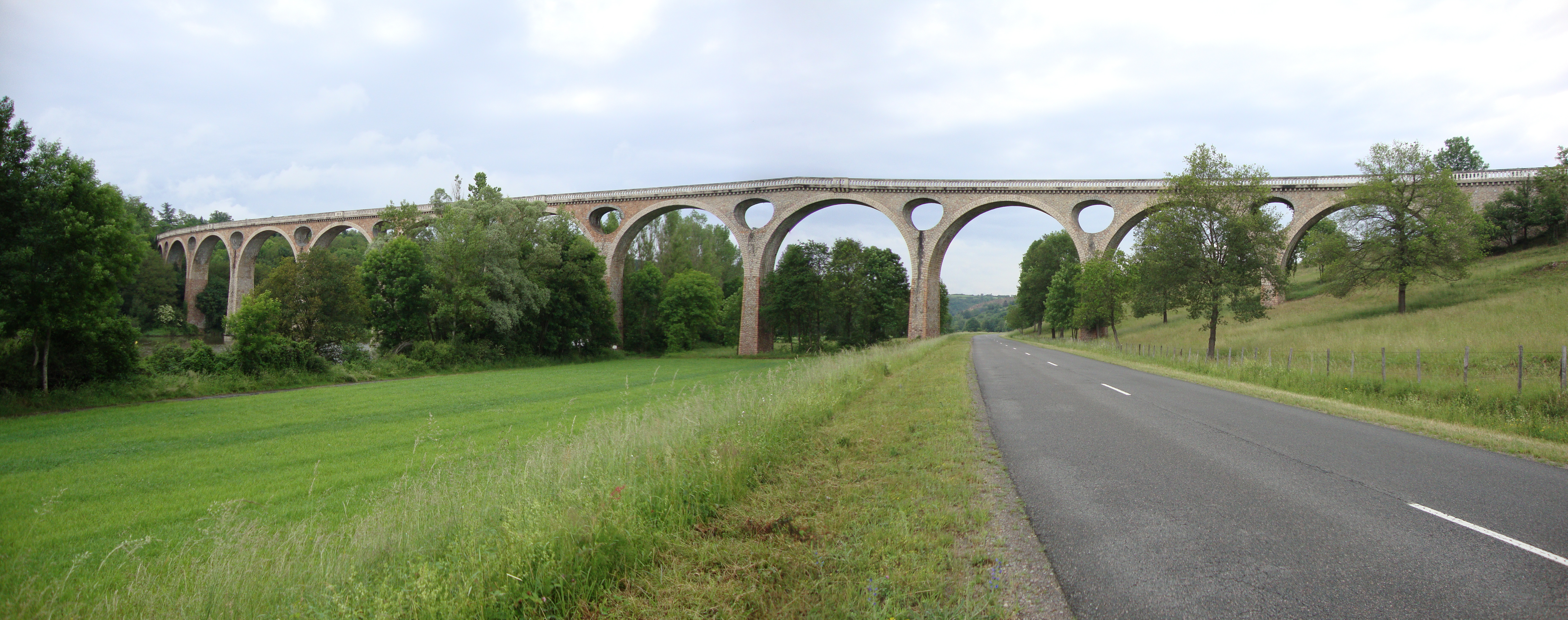 Saint-Georges-de-Baroille (Loire, Fr) Viaduc de Chessieux (montage 2 photo's).